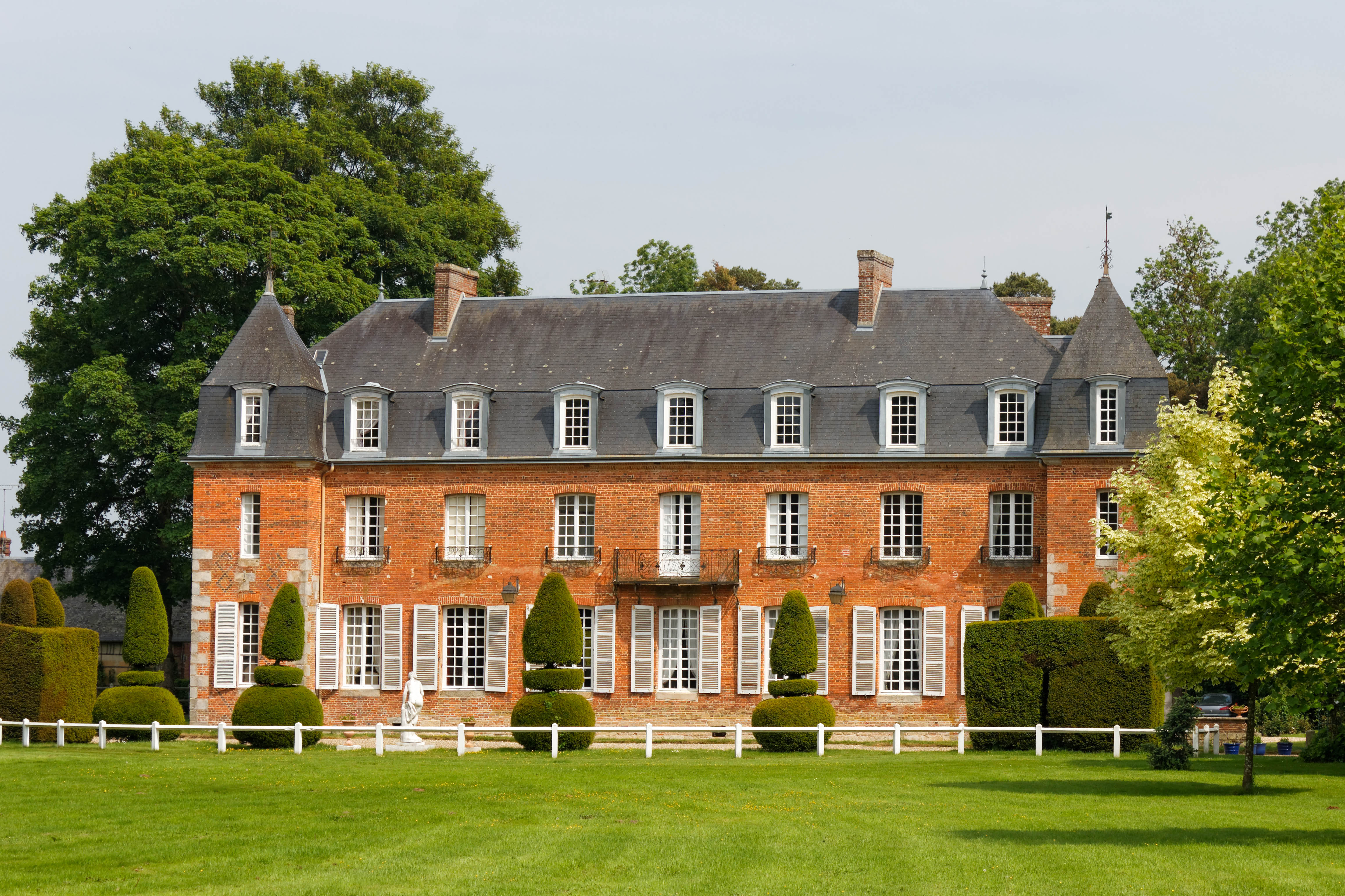 Façade du château de Bonneville.